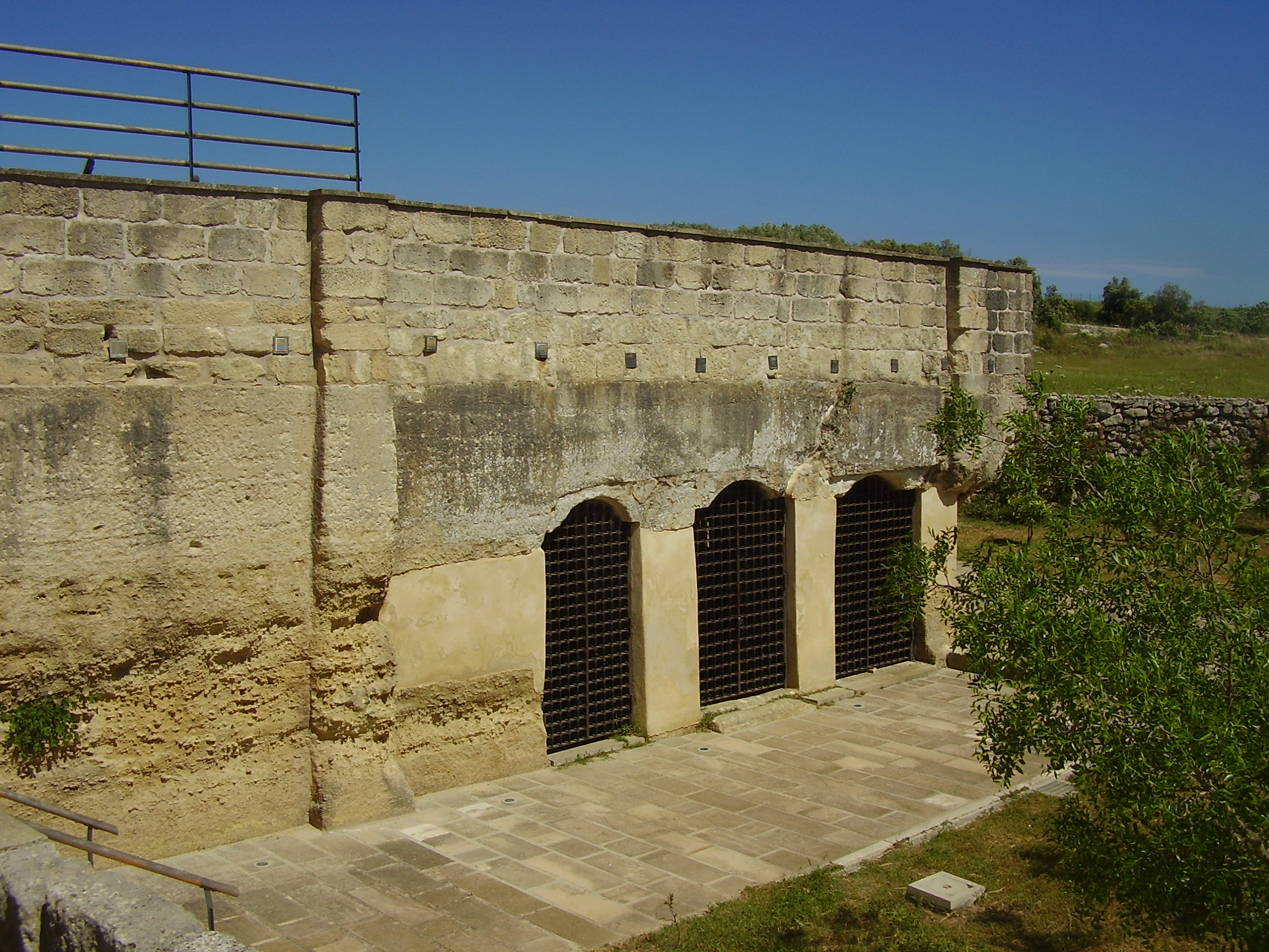 Cripta dei Santi Stefani di Vaste, Lecce